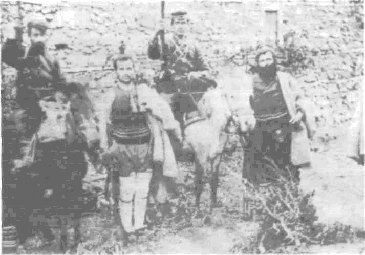 Найден Бъндев с другари от Баница.